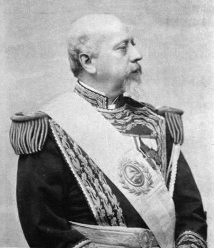 El ex presidente Julio Argentino Roca con la banda presidencial.